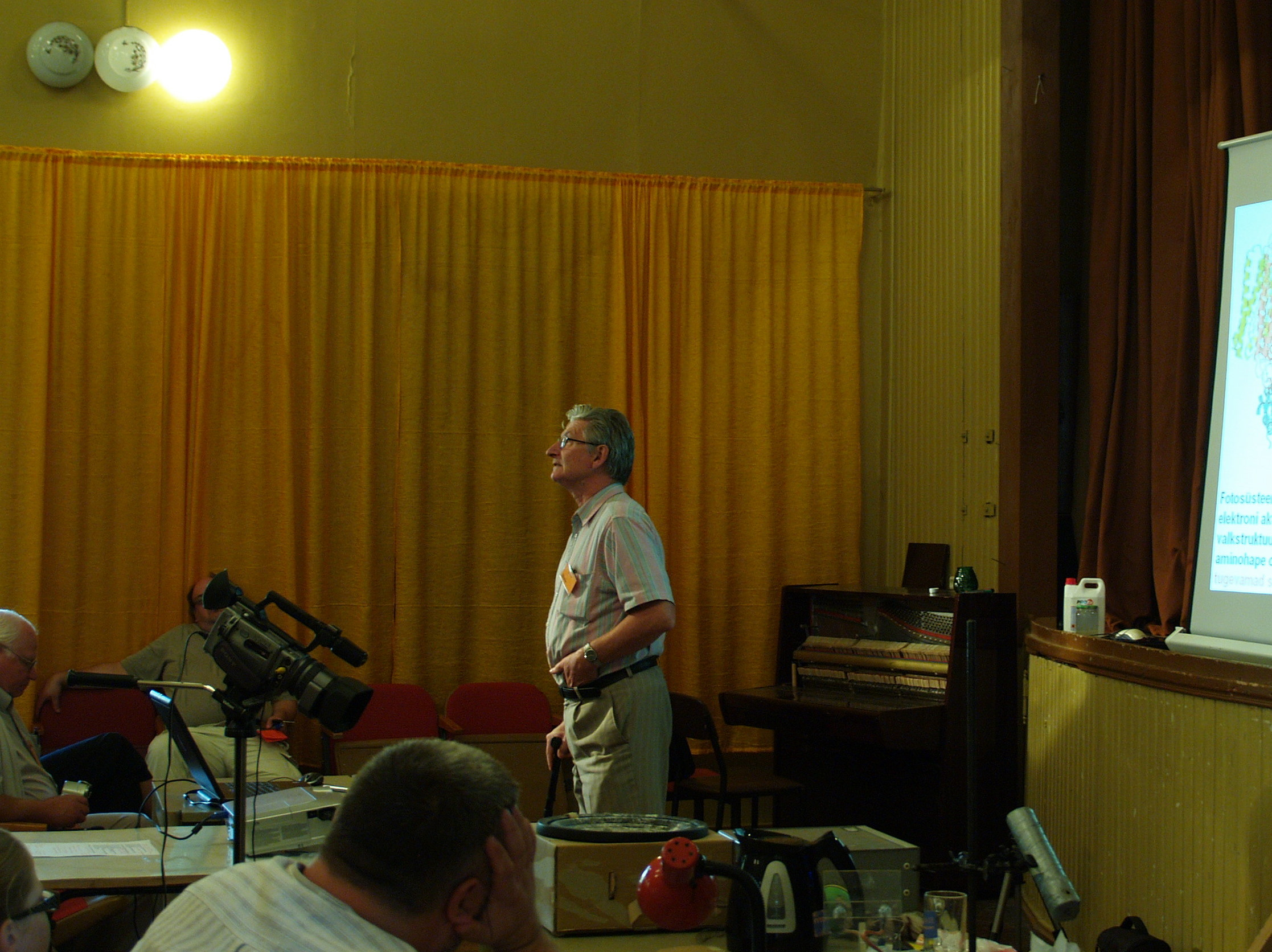 Agu Laisk teadus.ee suvekoolis pidamas ettekannet "Elu mõte".